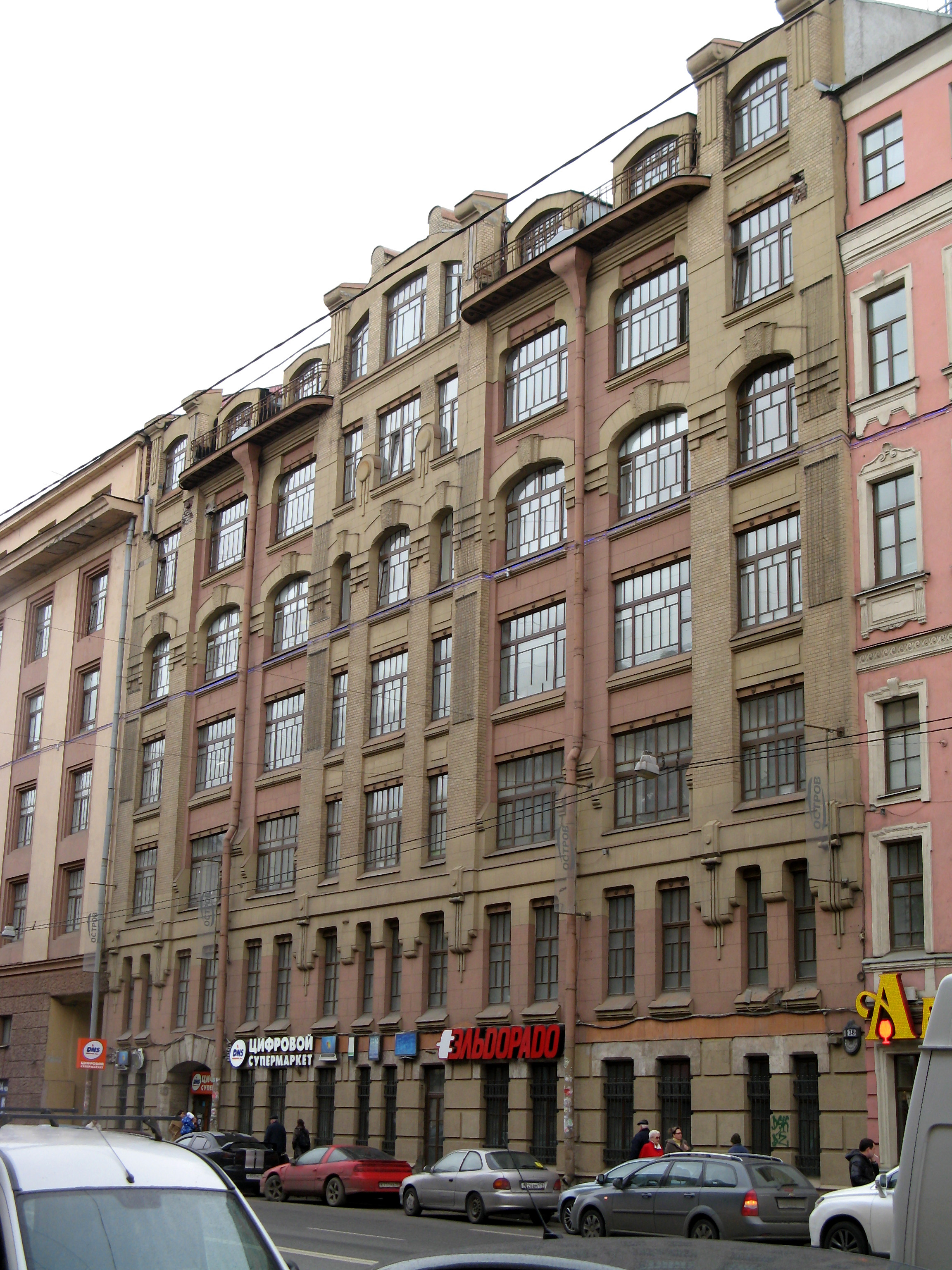 Комплекс построек для товарищества табачного производства «Лаферм» (табачная фабрика им. Урицкого), Санкт-Петербург